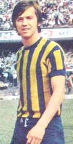 Hijitus Gómez